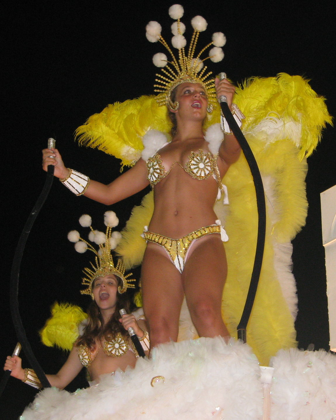 Salgueiro-29.JPG